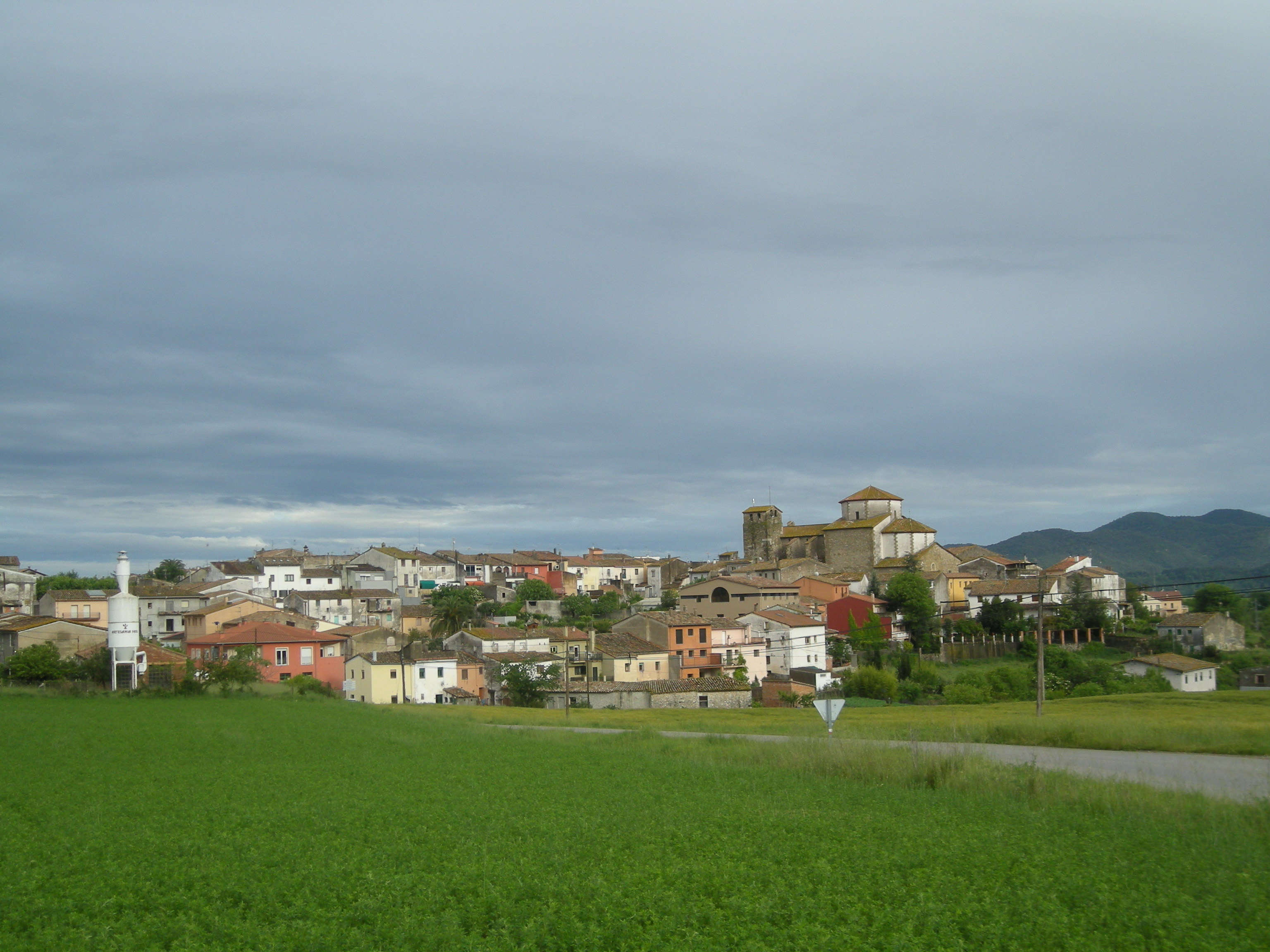 Vista de Tortellà